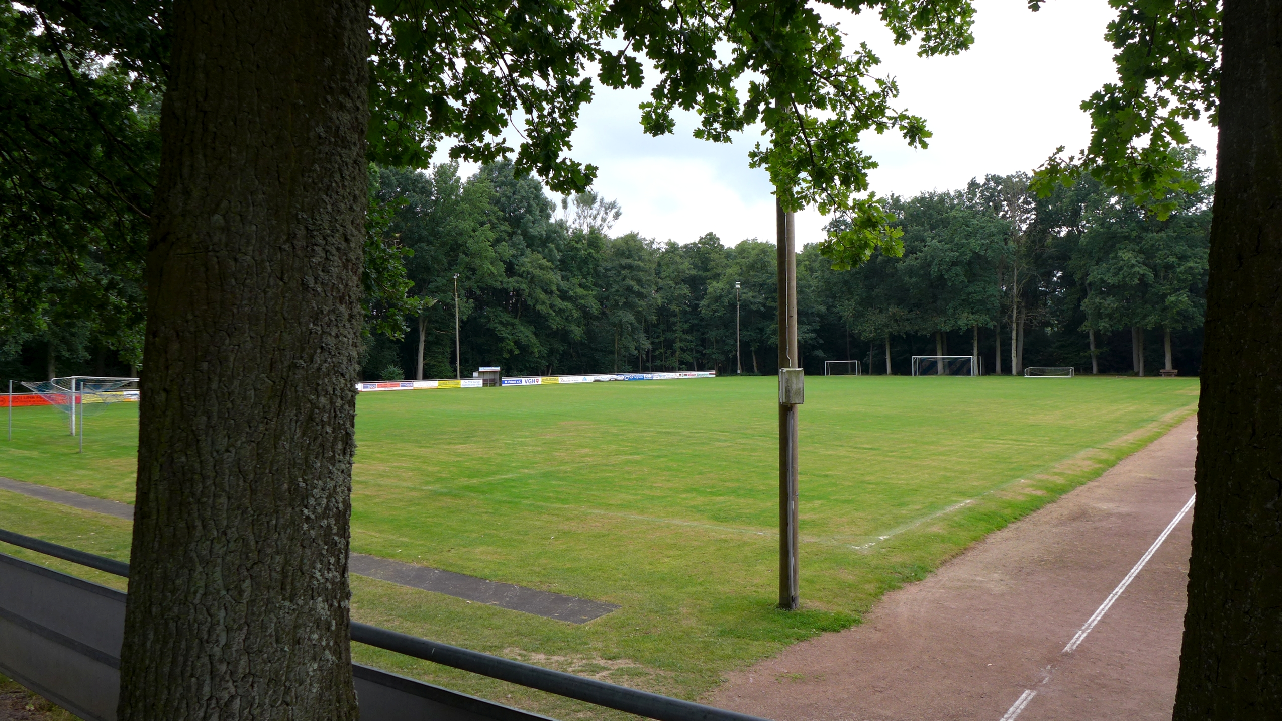 Sportplatz in der Gemeinde Tätendorf-Eppensen, einem Ortsteil von Barum im Landkreis Uelzen. Aufnahmedatum 2016-09.